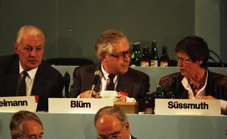 9.11.1987 35. Bundesparteitag der CDU in der Beethovenhalle, Bonn.